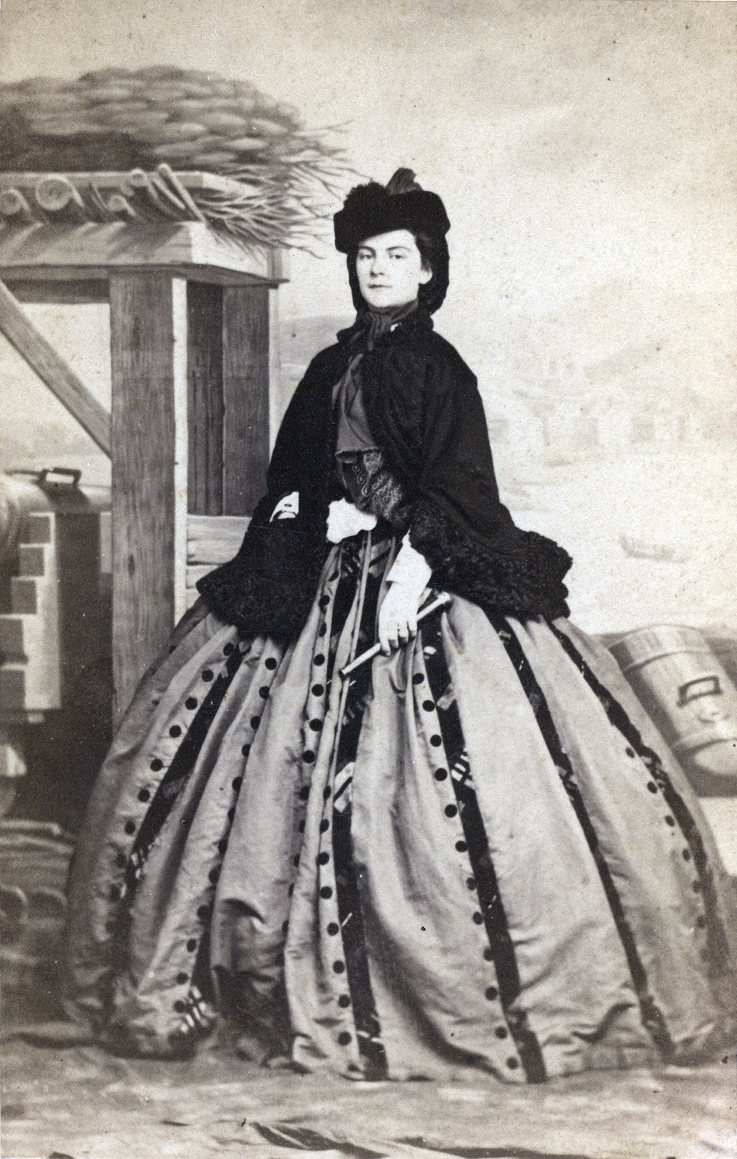 Marie in Bayern, Königin beider Sizilien auf Reisen. Sie war eine jüngere Schwester der österreichischen Kaiserin Elisabeth.